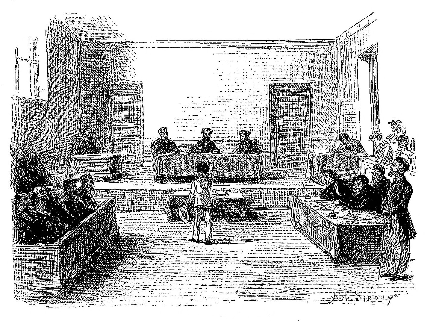 illustration du livre en format djvu sur commons